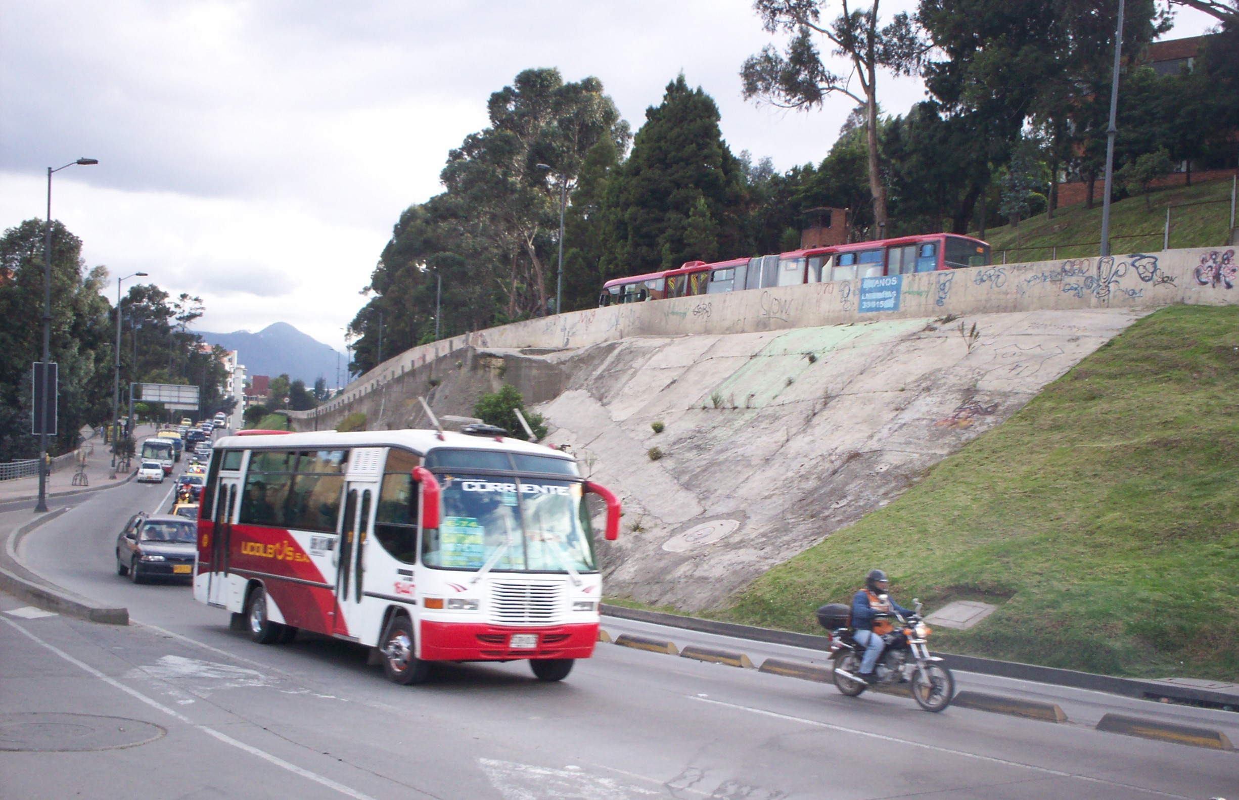 Avenida Suba - Sector de Vidrio Muran